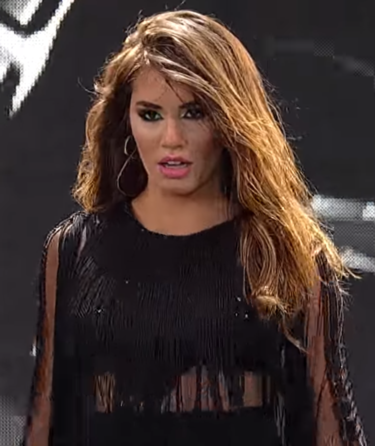 La cantante argentina Lali Espósito, miembro del Jurado Internacional del 58° del Festival Internacional de la Canción de Viña del Mar, se presentó en la jornada de cierre de Viña 2017 deleitando al público de la Quinta Vergara con repertorio pop latino. Encuentra más vídeos de LALI ESPÓSITO en nuestro Canal Histórico...Recuerda, somos el Canal Histórico del Festival Internacional de la Canción de Viña del Mar.